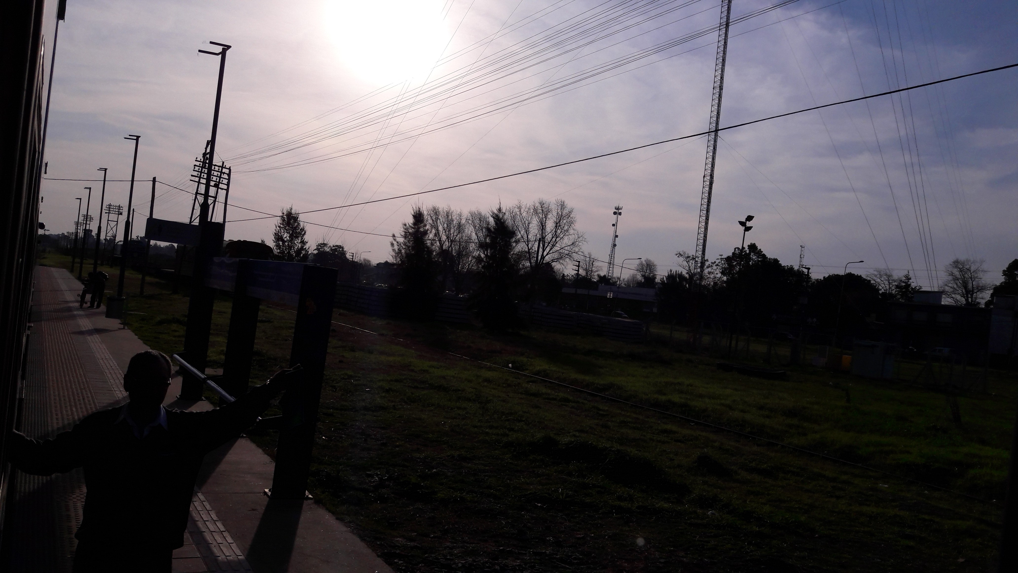 Estación Francisco Álvarez, Moreno, Ferrocarril Sarmiento.